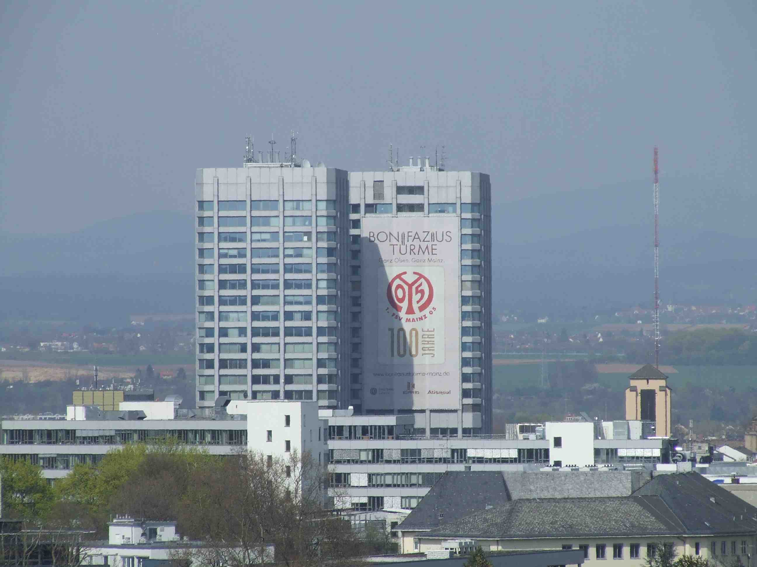 Bonifazius-Türme in Mainz. An einem Turm ist seit 2005 ein großes Poster das an den 100 Geburtstag vom 1. FSV Mainz 05 erinnert.